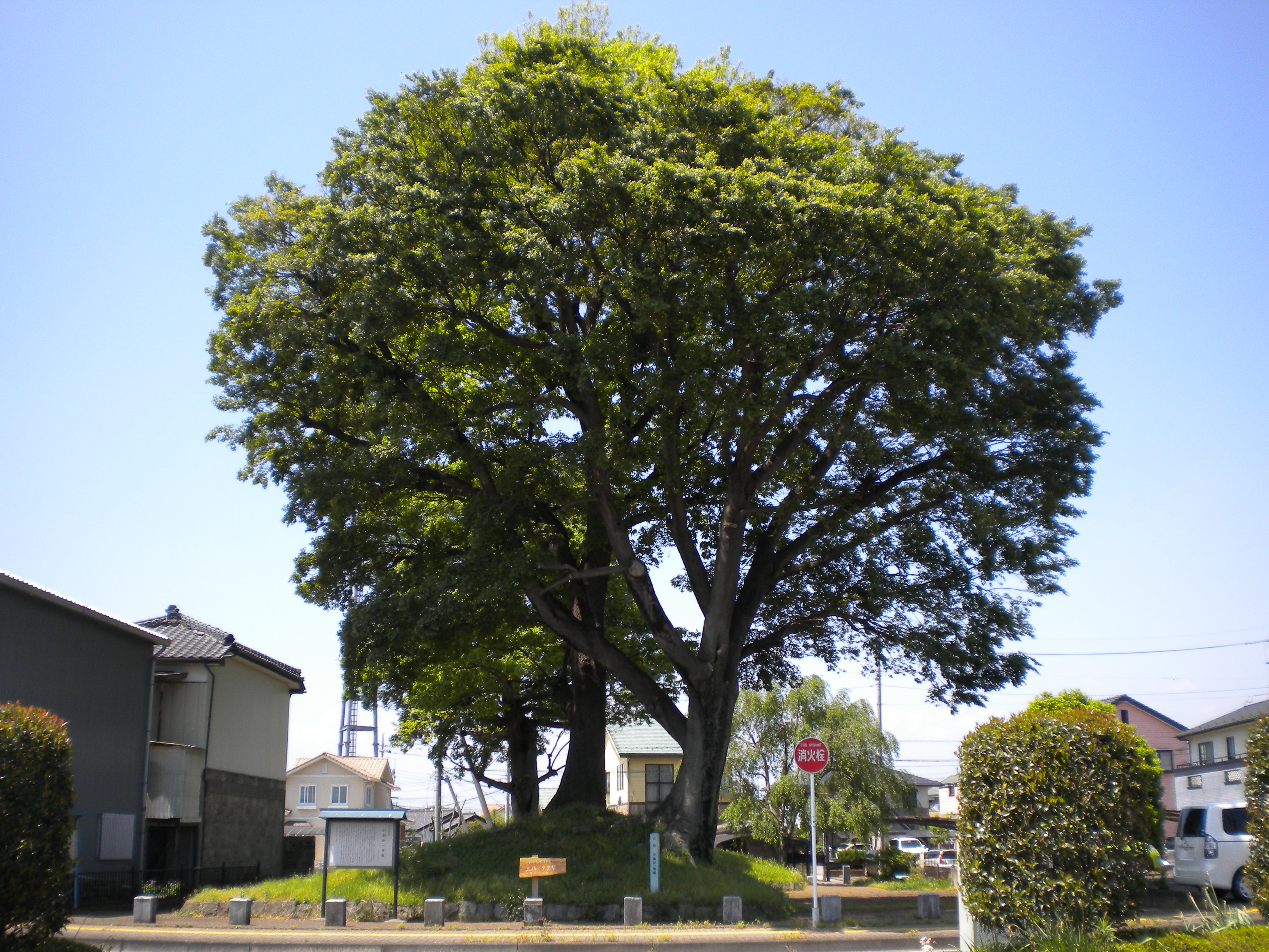 日光街道小金井一里塚 栃木県下野市小金井 投稿者撮影